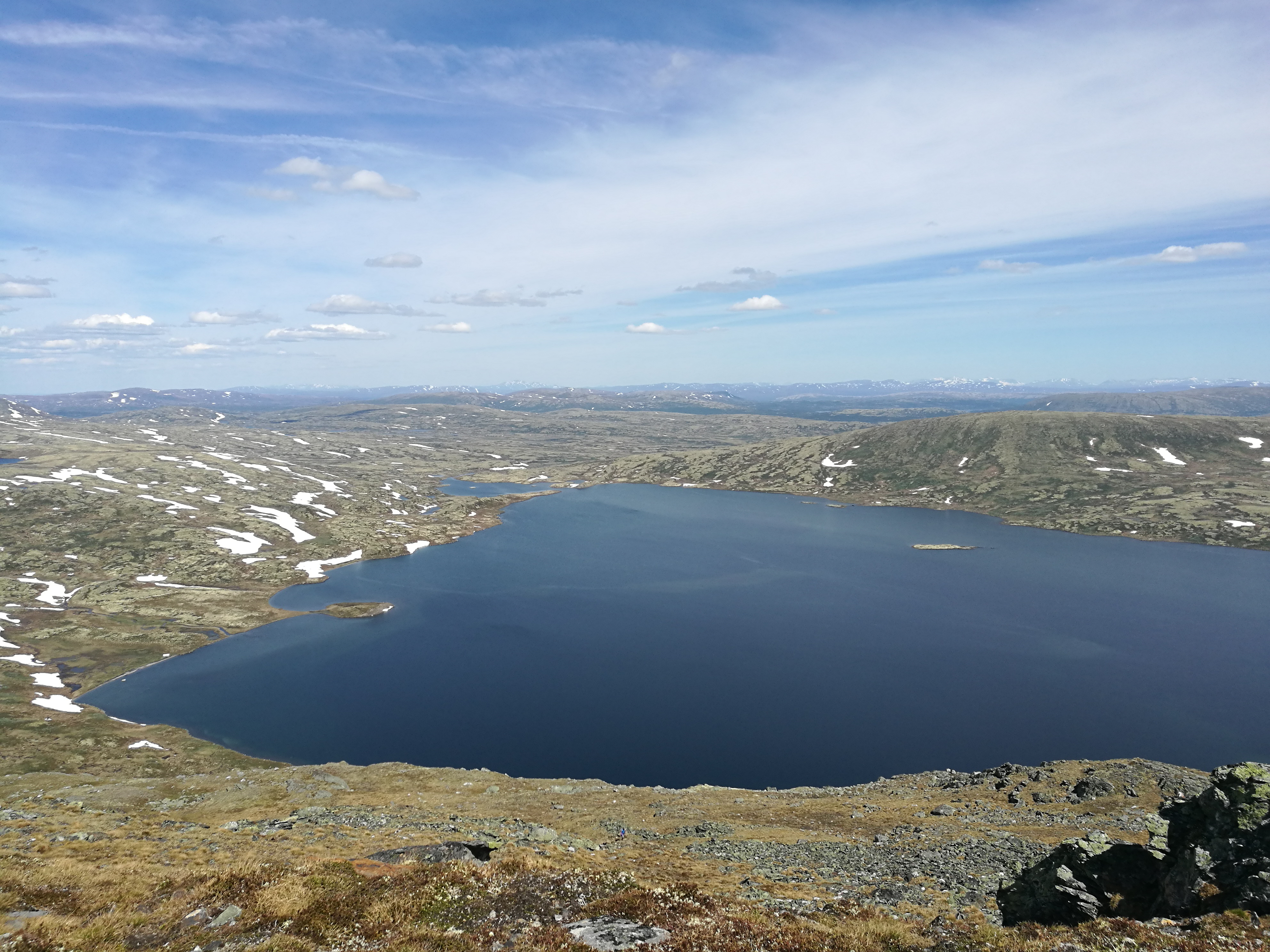 Forollsjøen sett fra toppen av Forollhogna